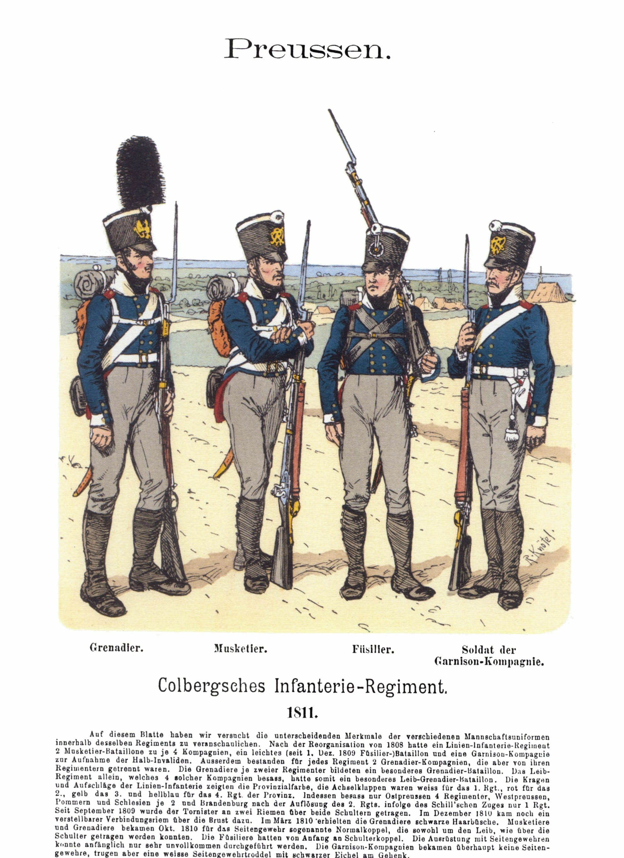 Иллюстрация Рихарда Кнотеля